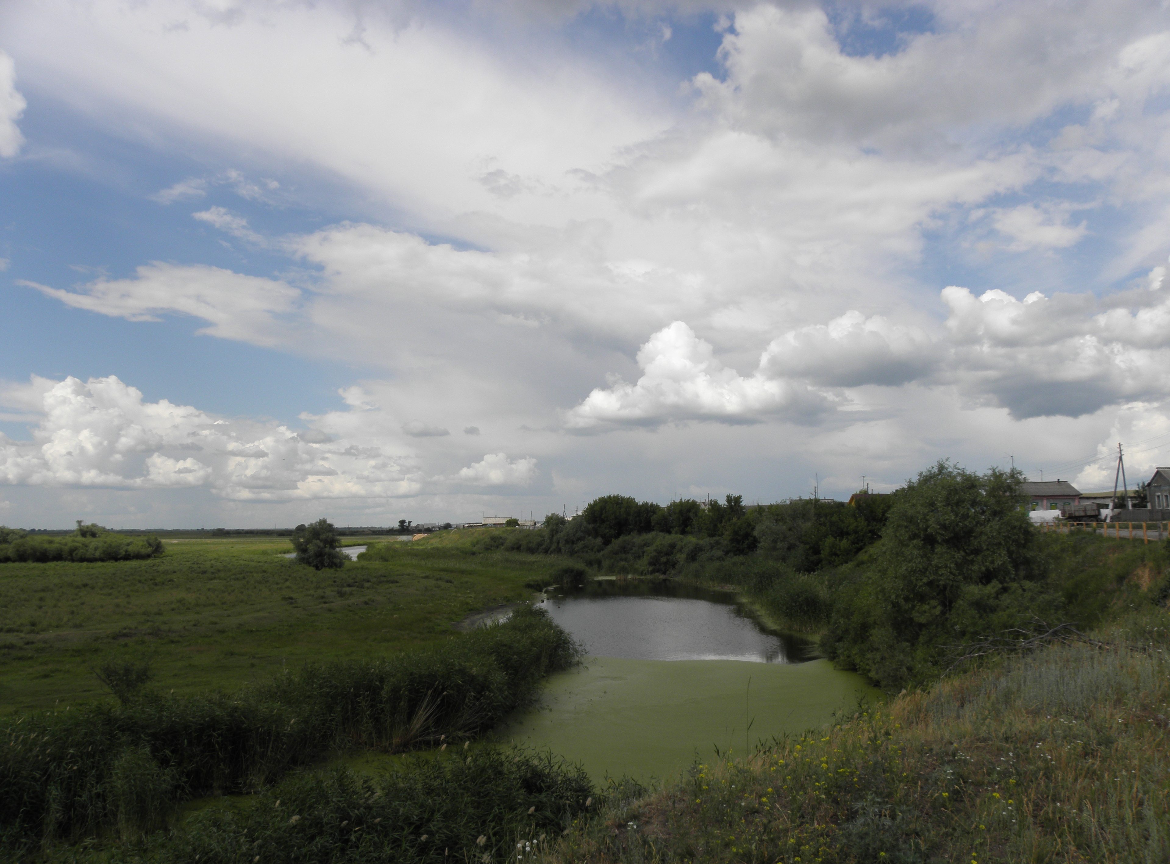 Село Афонькино Казанского района. Озеро на ул. Береговой